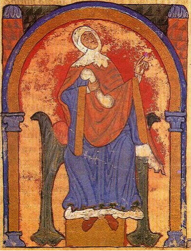 Elvire, sœur d’Alphonse VI